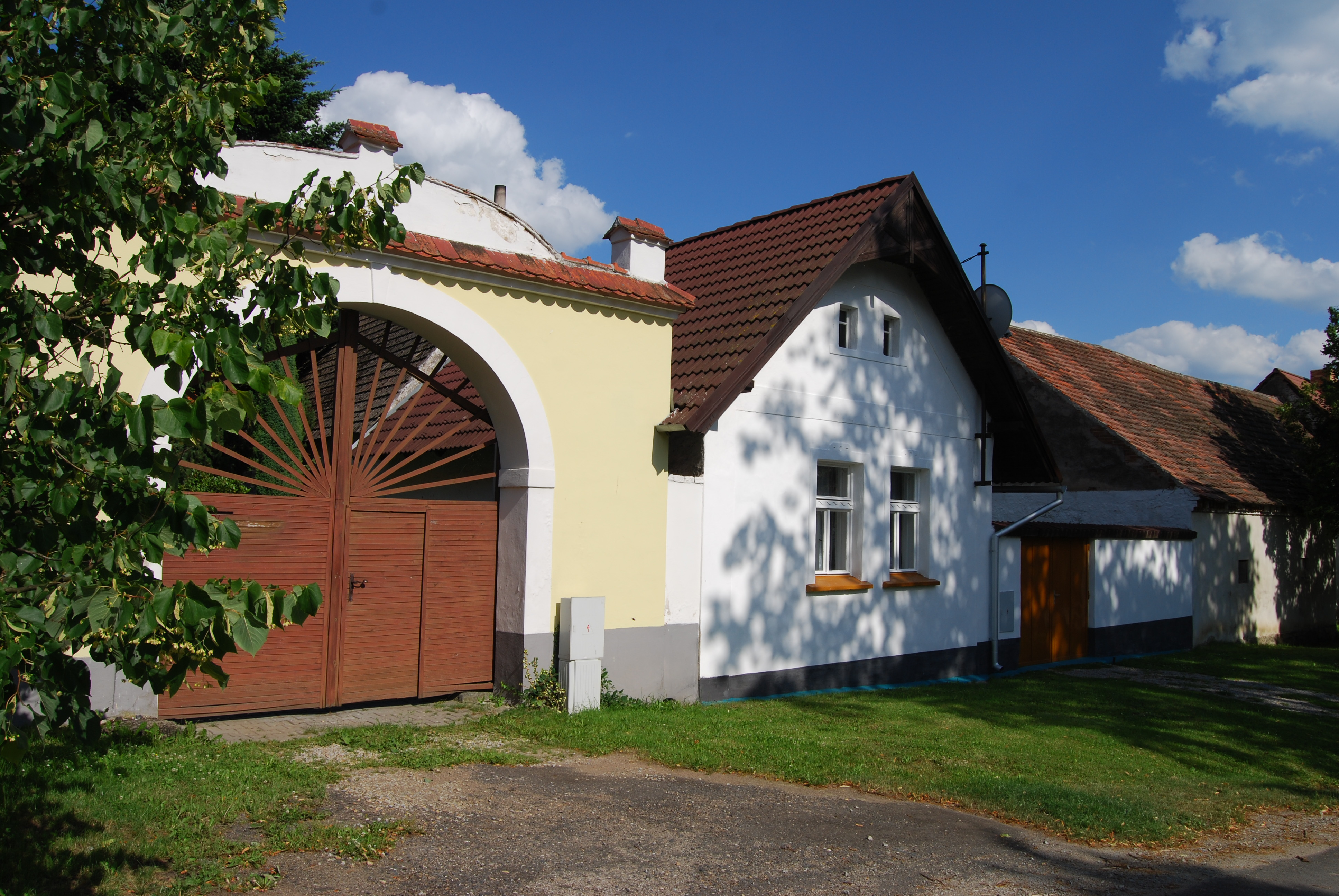 Pohled na část obce. Lučkovice je část města Mirotice v okrese Písek. Česká republika.